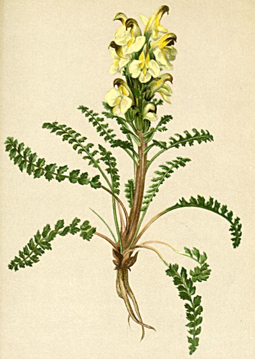 Pedicularis versicolor (Pedicularis oederi)